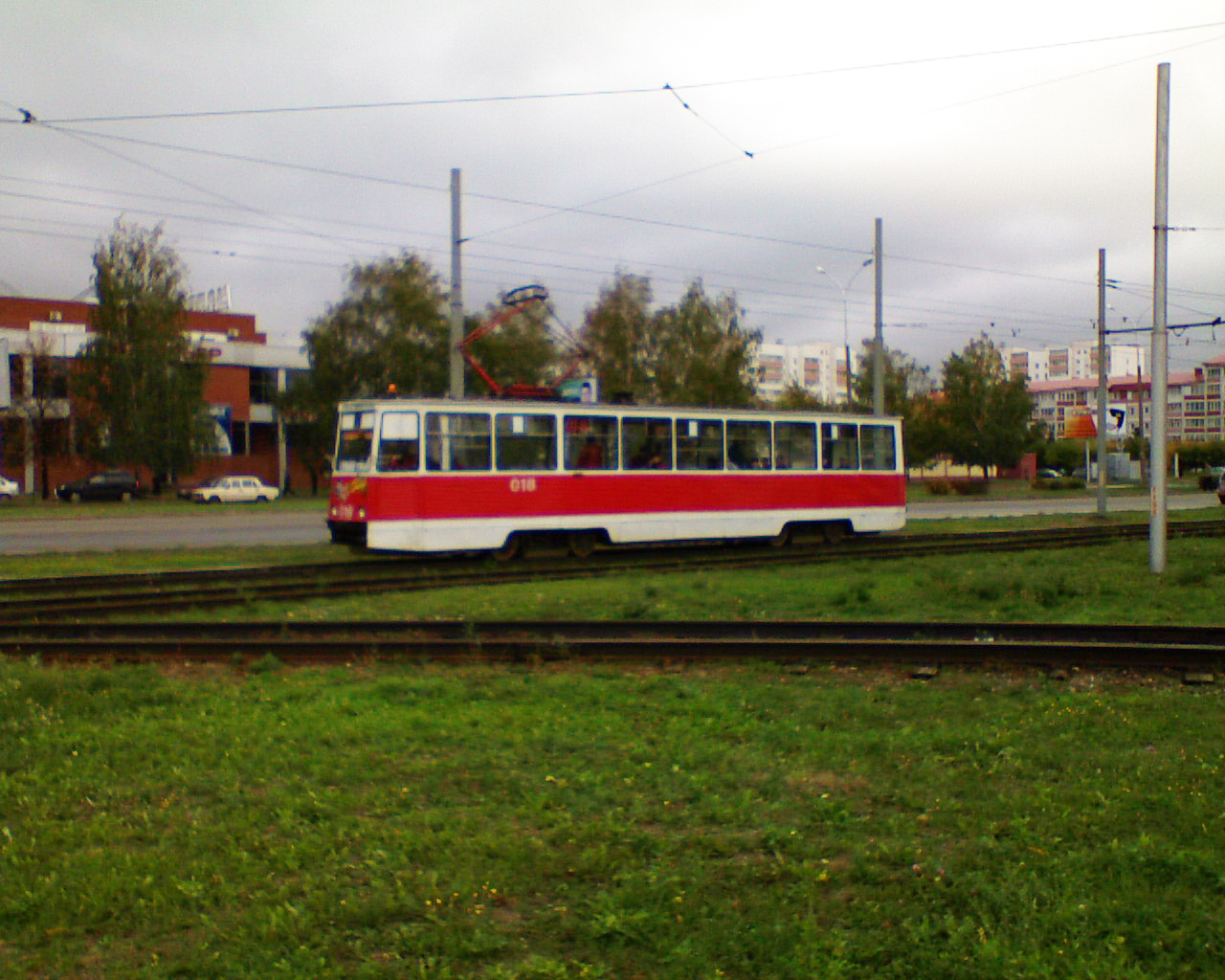 Трамвай 71-605 на Московском проспекте в Набережных Челнах